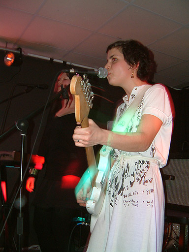 En bild på Andrea Kellerman tagen under en spelning på Klubb Utopi i Skövde